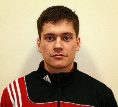 Koskenkorvan Urheilijoiden kauden 2014 pelaajakuva. Pelaaja: Jouni Koskela